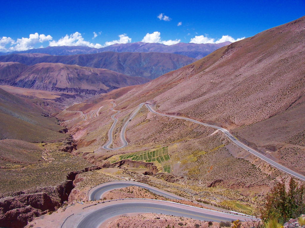 Ruta Nacional 52 en la Cuesta de Lipán, cerca de Purmamarca, provincia de Jujuy, Argentina.